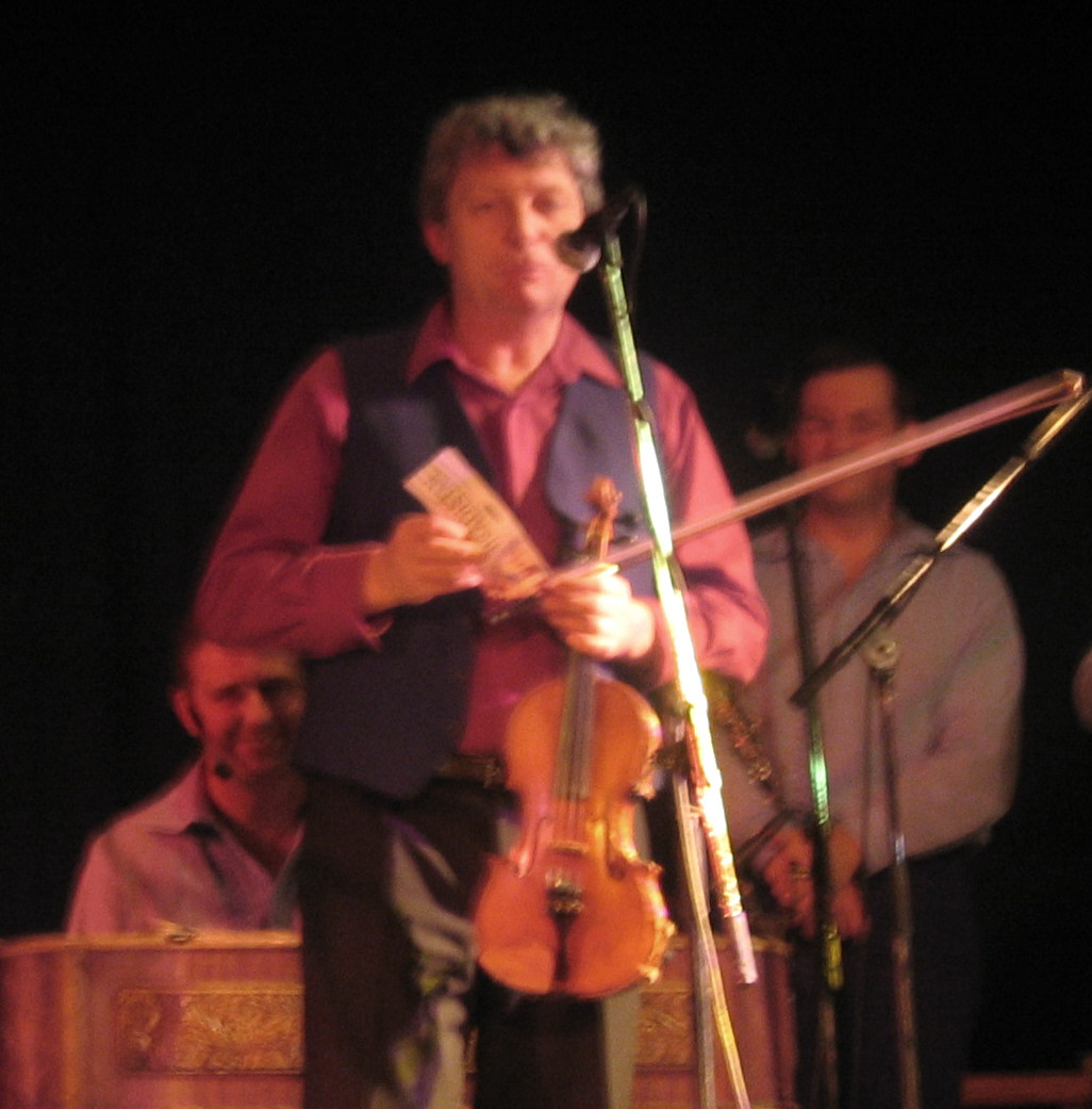 Jiří Pavlica (1953-) kun ensemblo Hradišťan dum koncerto en Písek (Ĉeĥio) en 2005